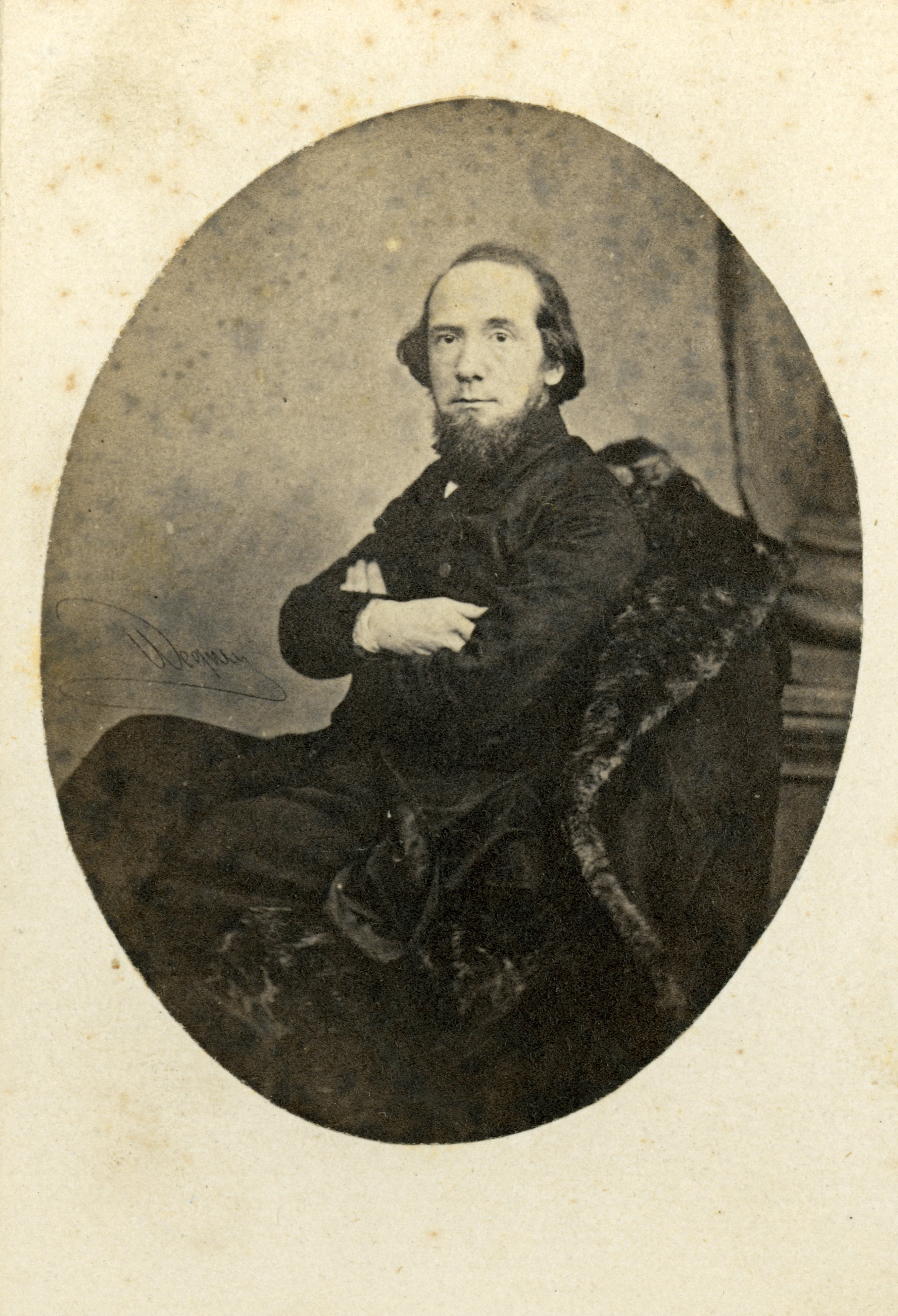 A.J. Ehnle, schilder, geboren te Den Haag op 5 februari 1819, werkzaam tot 1846, overleden te Haarlem op 4 april 1863. Zwart-witfoto, afmetingen (h x b) 7 x 5 cm Collectie Foto's Haags Gemeentearchief, identificatienr. 1.62168